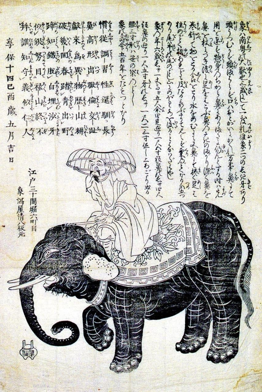 江戸の瓦版に描かれた「従四位広南白象」（1729年）